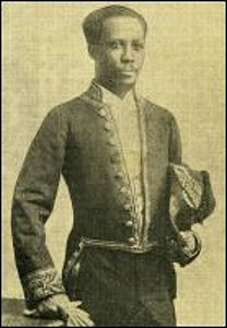 ortrait du diplomate et poète haïtien Massillon Coicou.